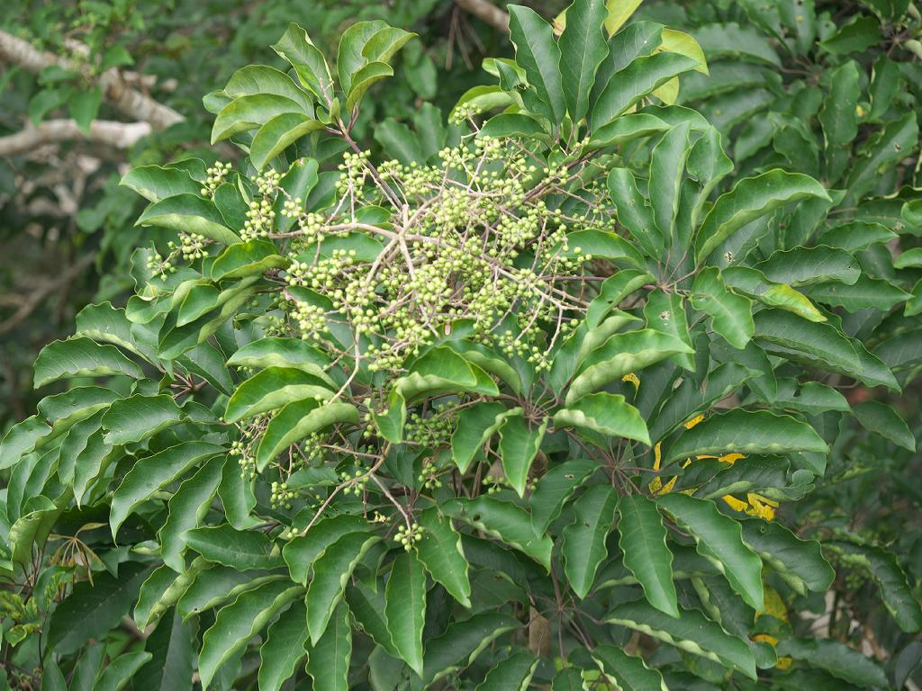 2020/01/01 沖縄本島：Okinawa Island, Japan